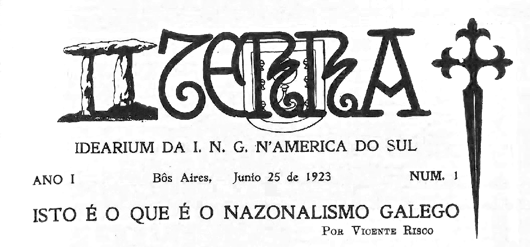 Terra. Idearium da I.N.G. n’America do Sul